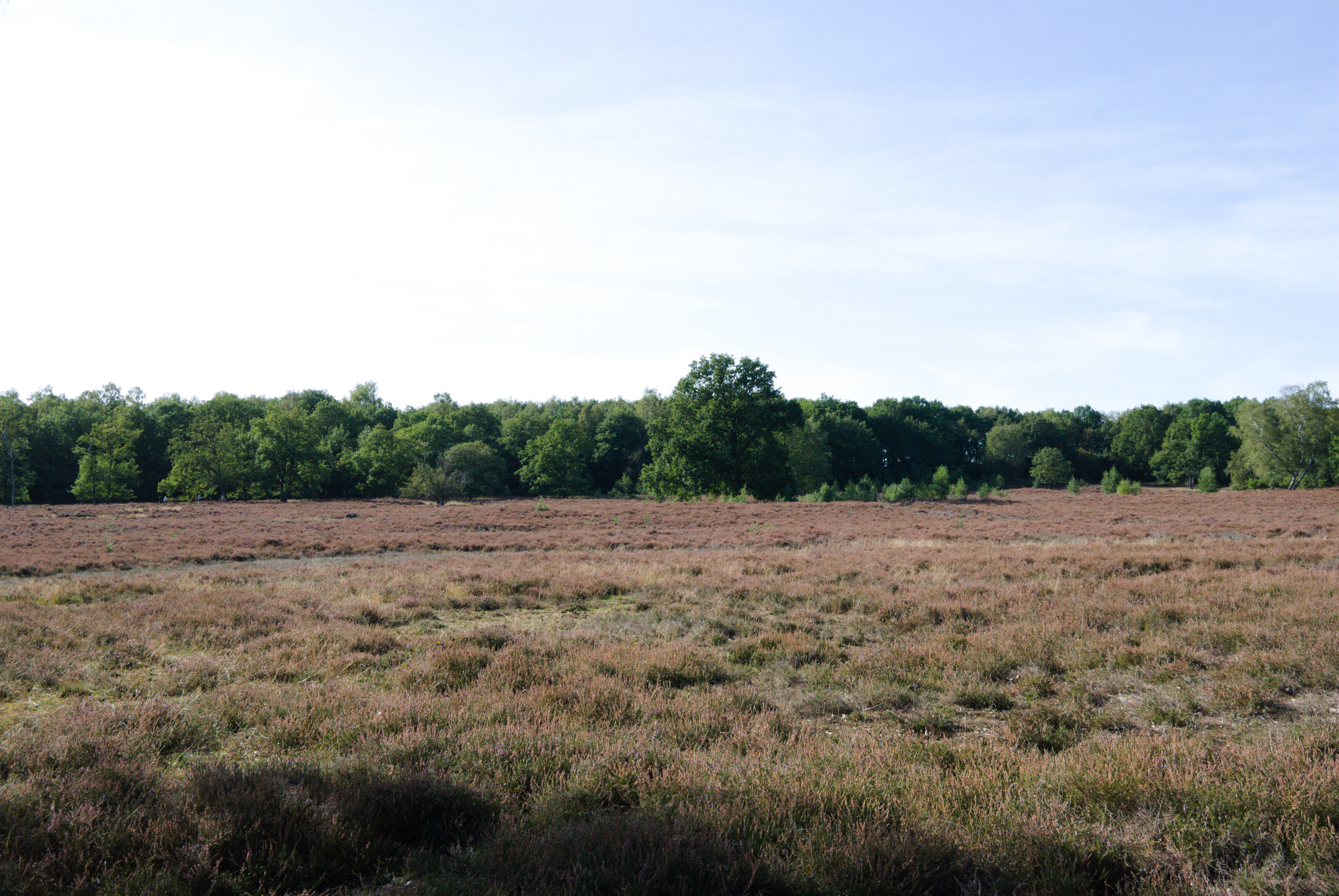 Heidefläche in der Hügelgräberheide Halle-Hesingen